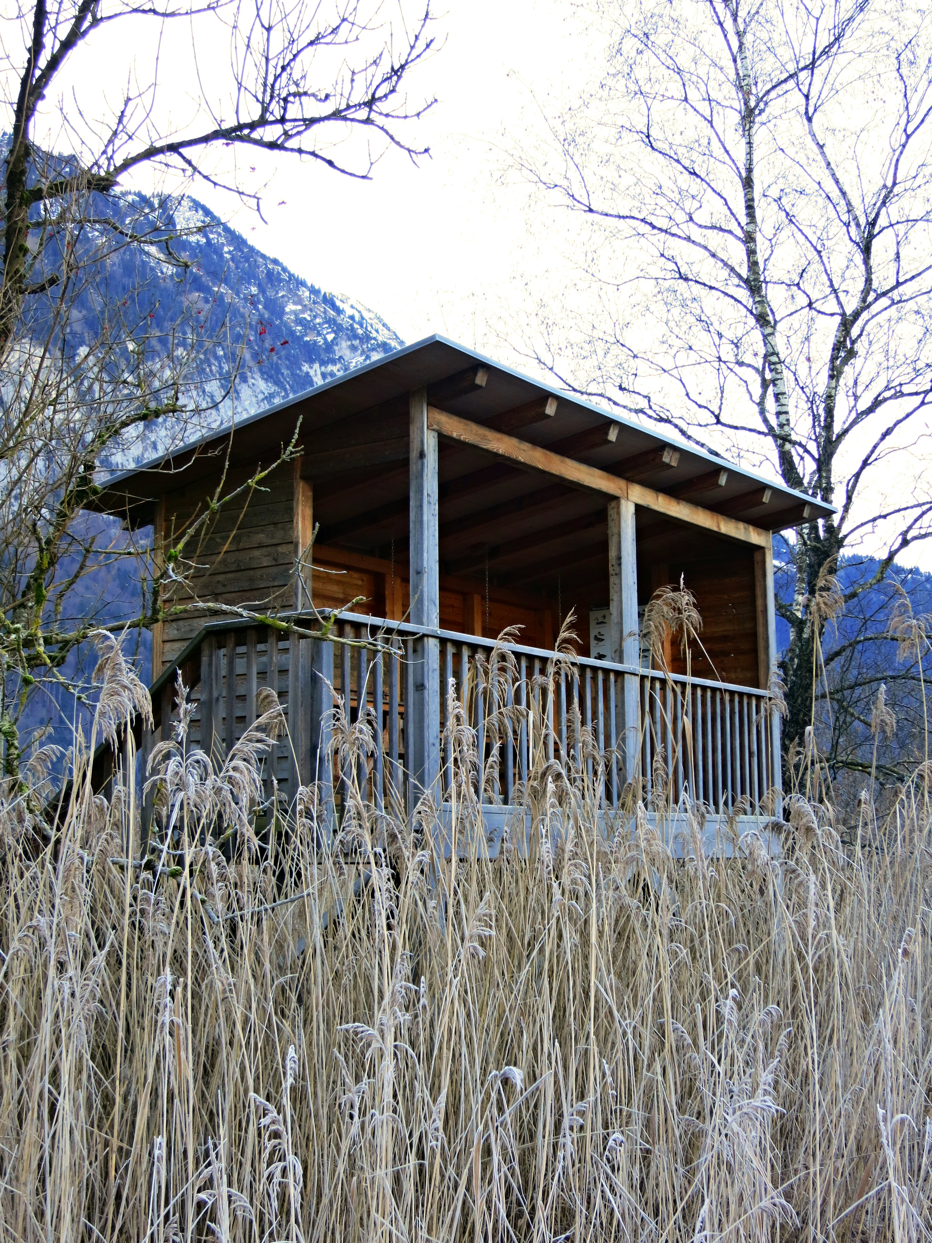 Weissenauer Beobachtungsturm